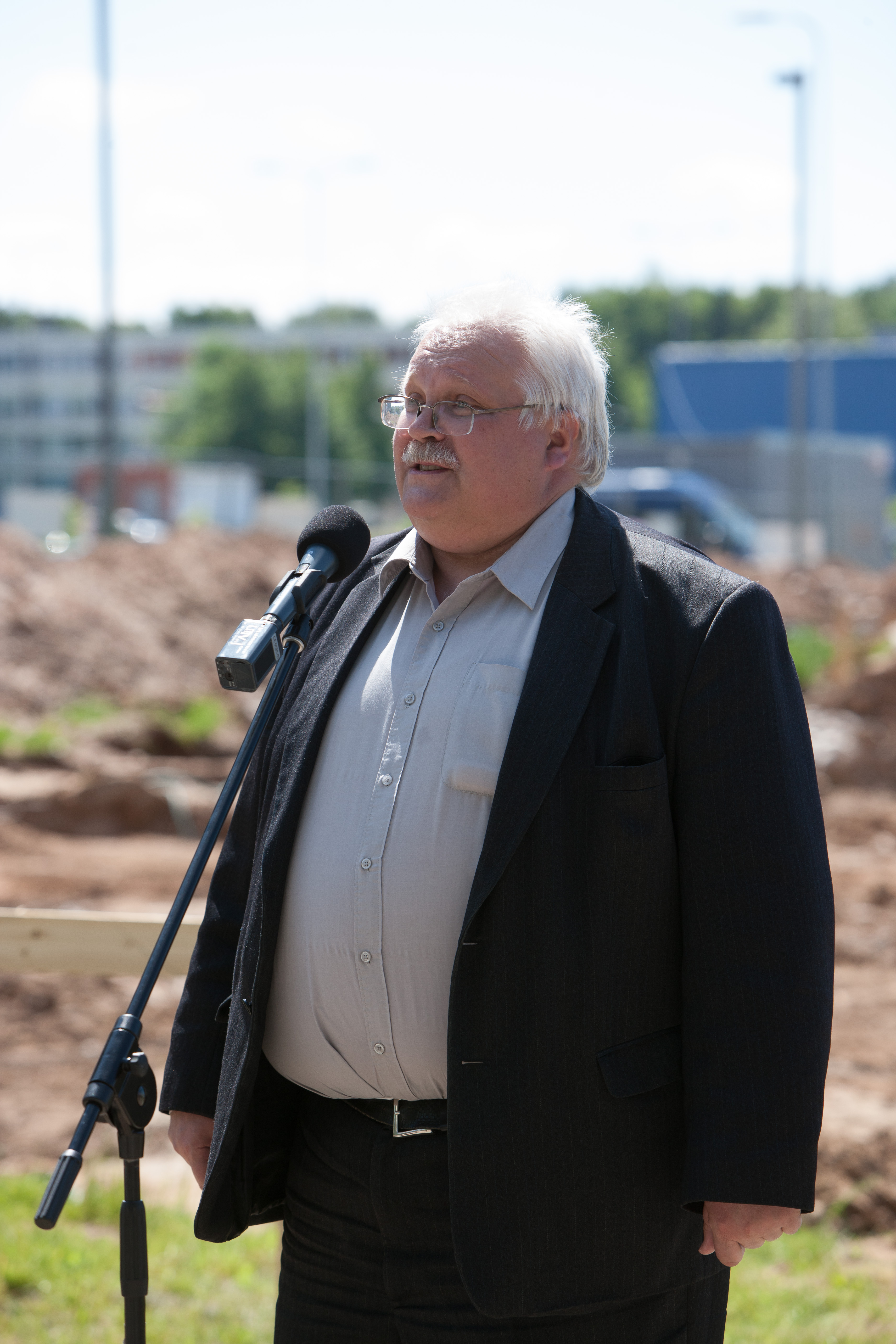 14. juunil 2012 pandi pidulikult nurgakivi Tartu ülikooli siirdemeditsiinikeskusele (SIME), mis valmib Chemicumi juurdeehitusena Viljandi mnt 42 krundile TÜ Maarjamõisa tehnoloogialinnakus. Ühtlasi allkirjastati ka ülikooli uue füüsikahoone ehitusgraafik. Pildil professor Ergo Nõmmiste.